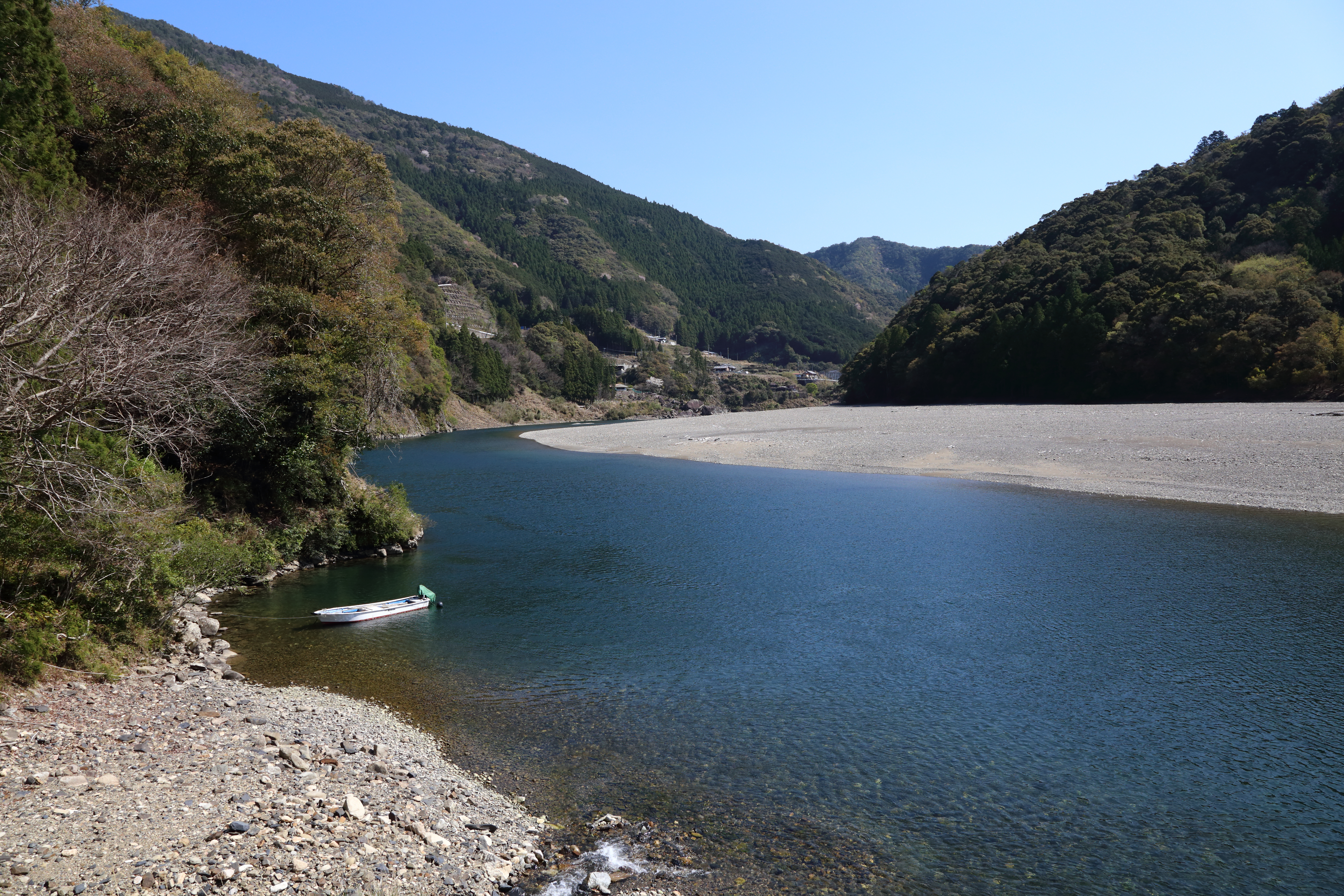 百夜月 船着場 （和歌山県新宮市熊野川町九重側） 紀和町花井